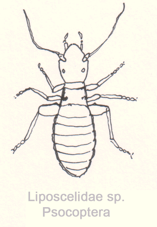 Liposcelidae sp. Psocoptera